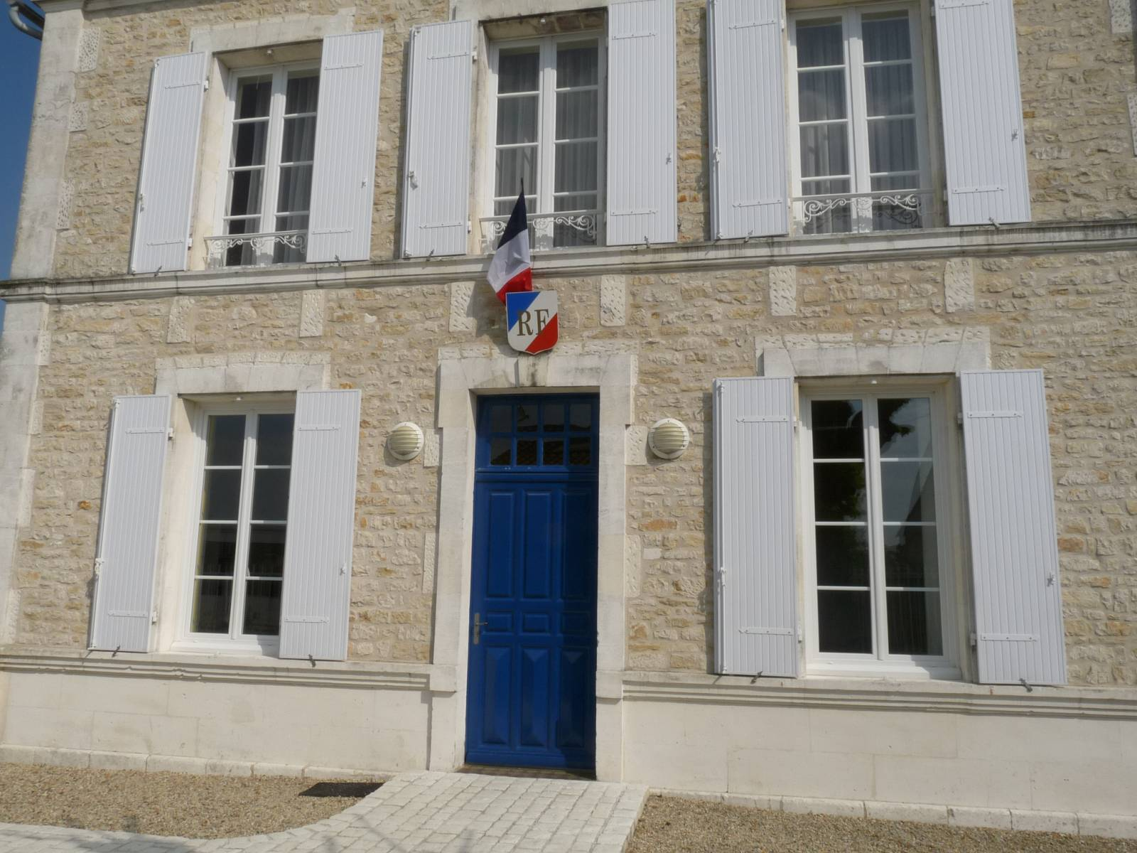 Mairie de Triac-Lautrait, Charente, France